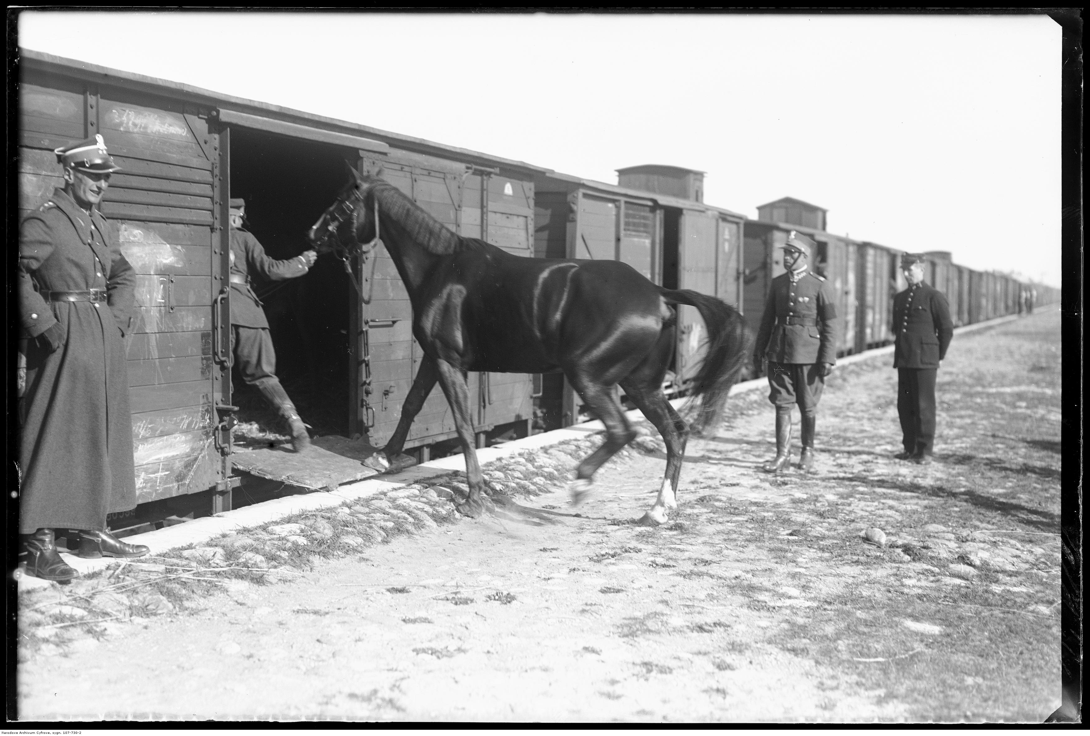 Odjazd na uroczystości pogrzebowe. Ładowanie koni do wagonów.